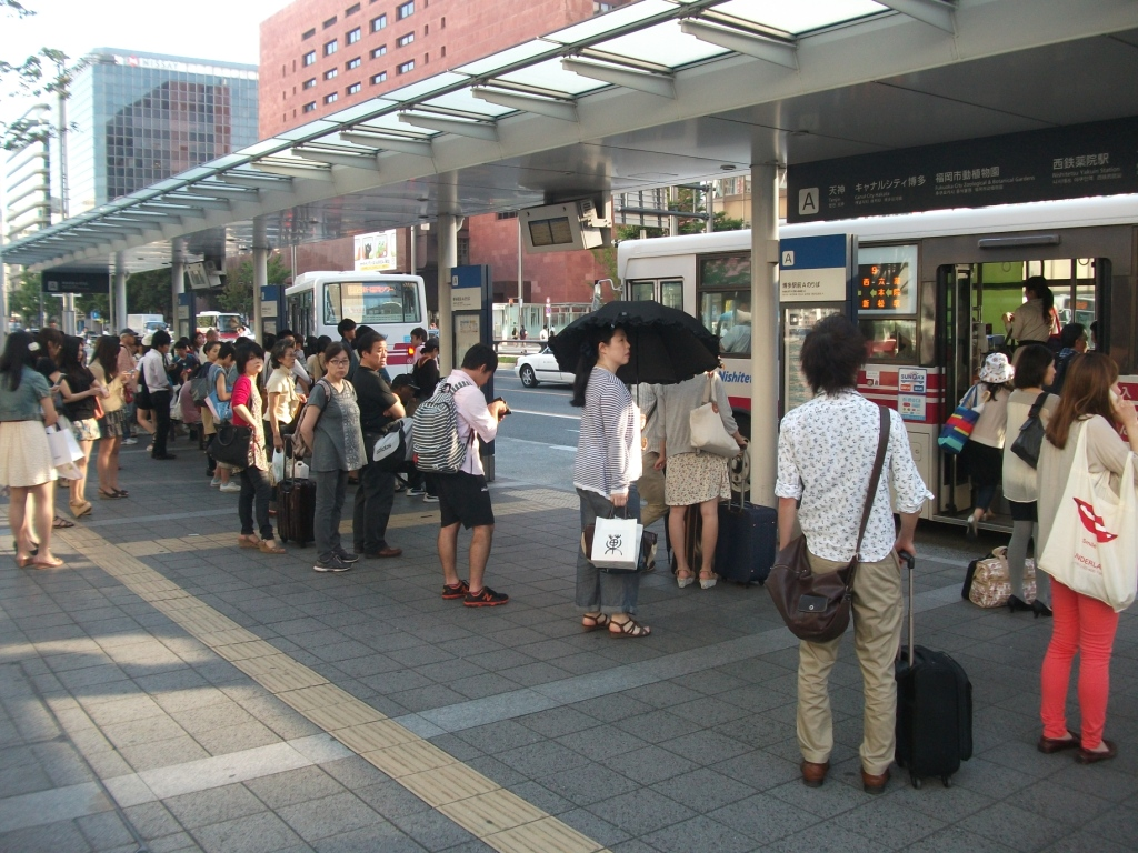 博多駅前Aバスのりば